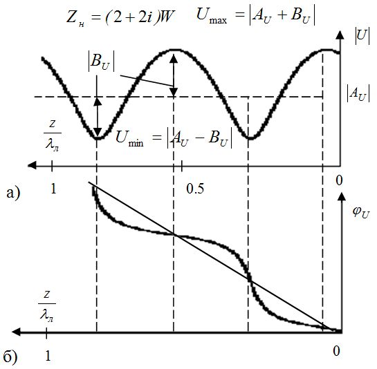 Эпюры напряжения в доль линии. а) Модуль распределения напряжения вдоль линии; б) Фаза распределения напряжения вдоль линии